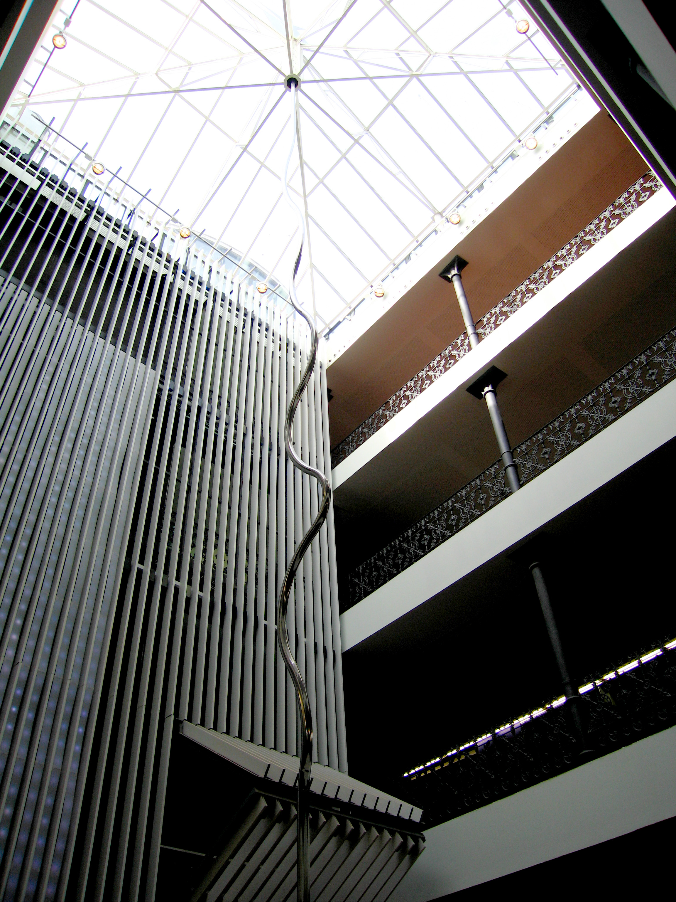 Fundació Octubre València